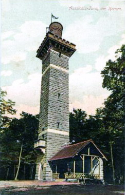 Kernenturm um 1900 Kernen bei Stuttgart Ansichtskarte um 1900